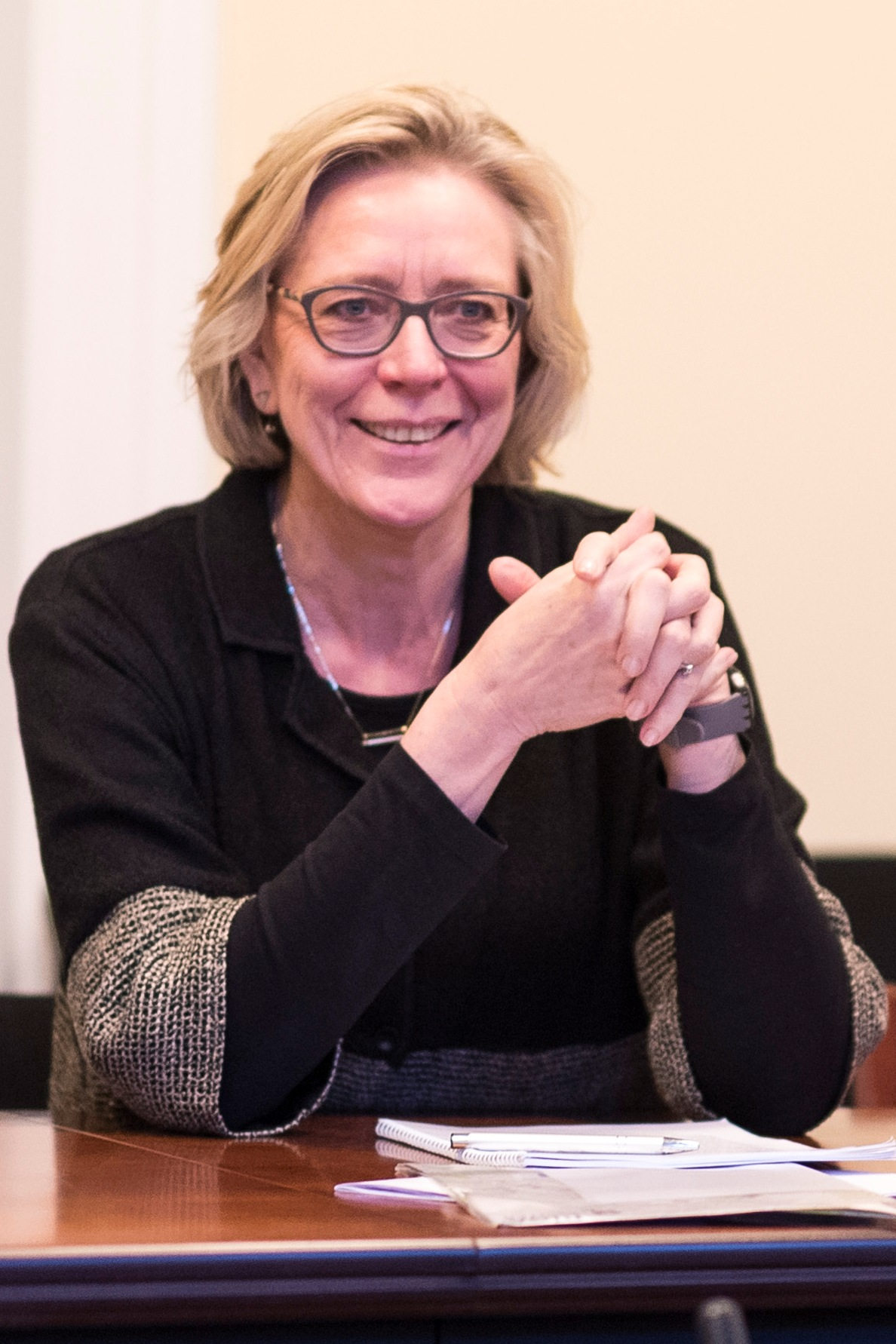 Elsbeth Tronstad